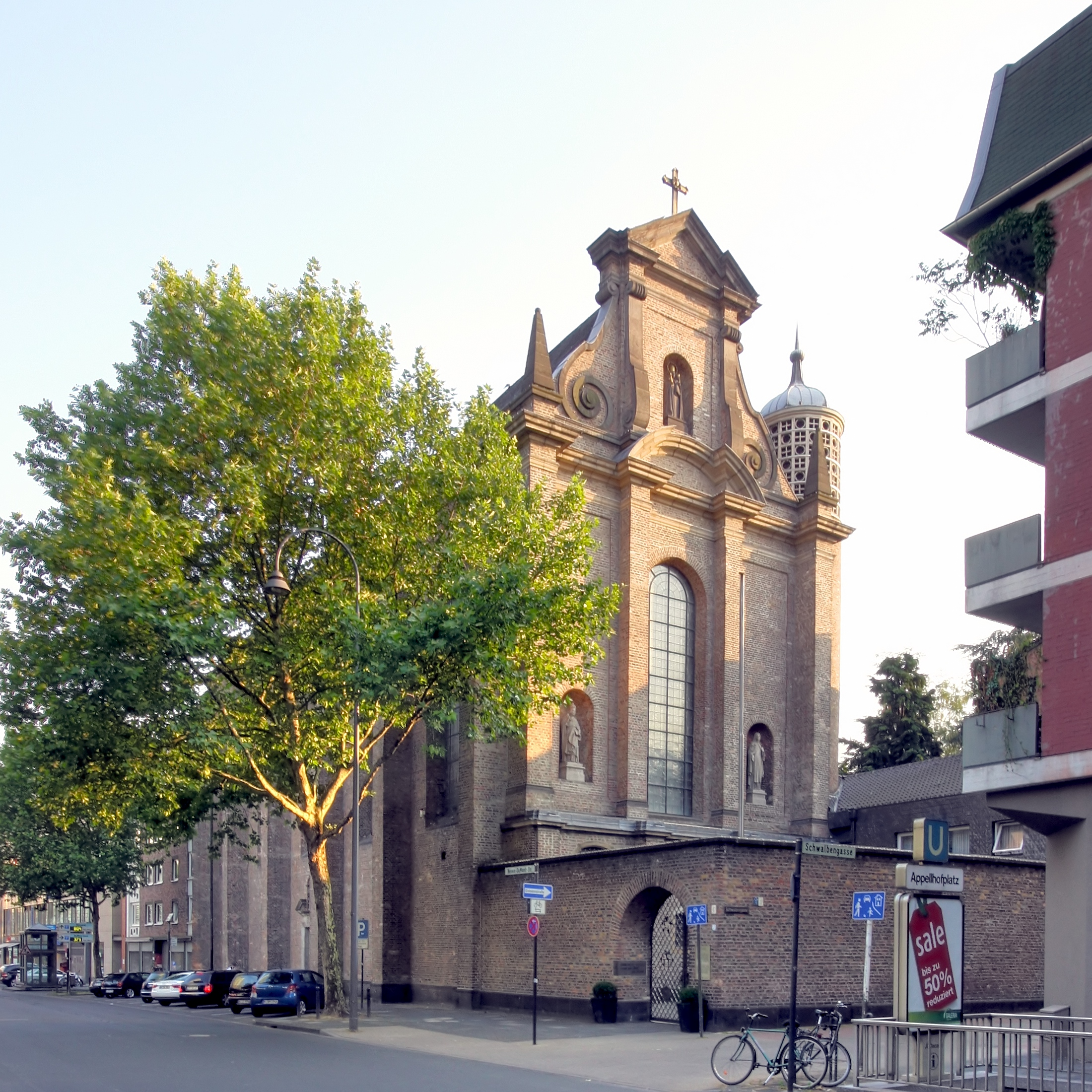 Nordseite der Kirche St. Maria in der Kupfergasse, Köln. This is a photograph of an architectural monument.